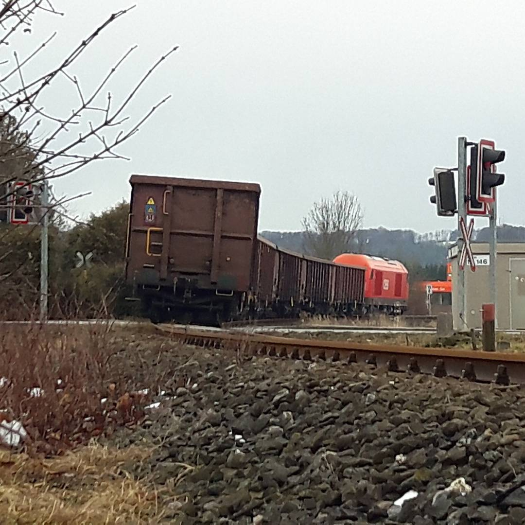 Ein Güterzug auf der Thermenbahn zwischen dem Bahnhof Fürstenfeld und der der Haltestelle Übersbach (Fürstenfeld).